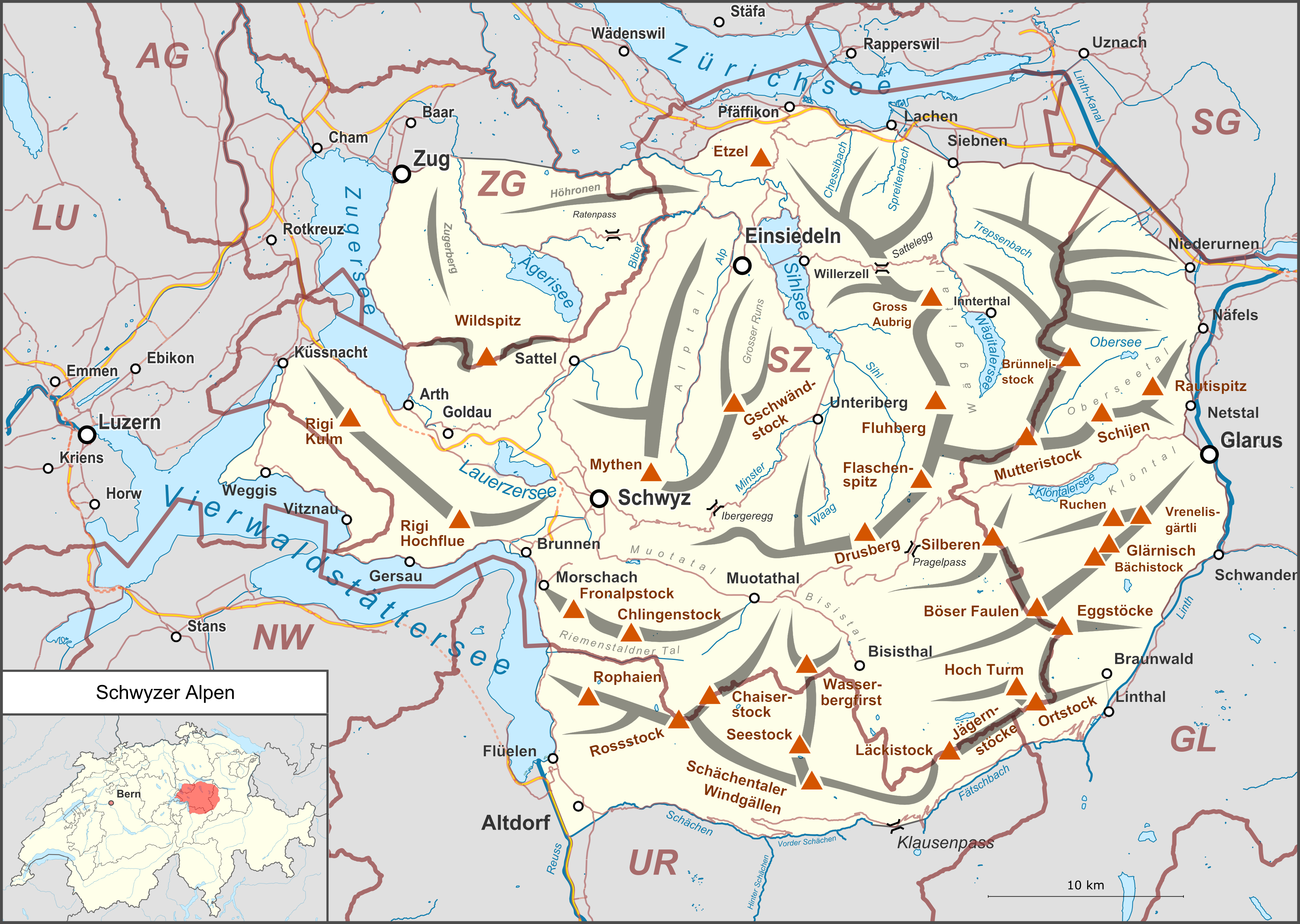 Lagekarte der Schwyzer Alpen